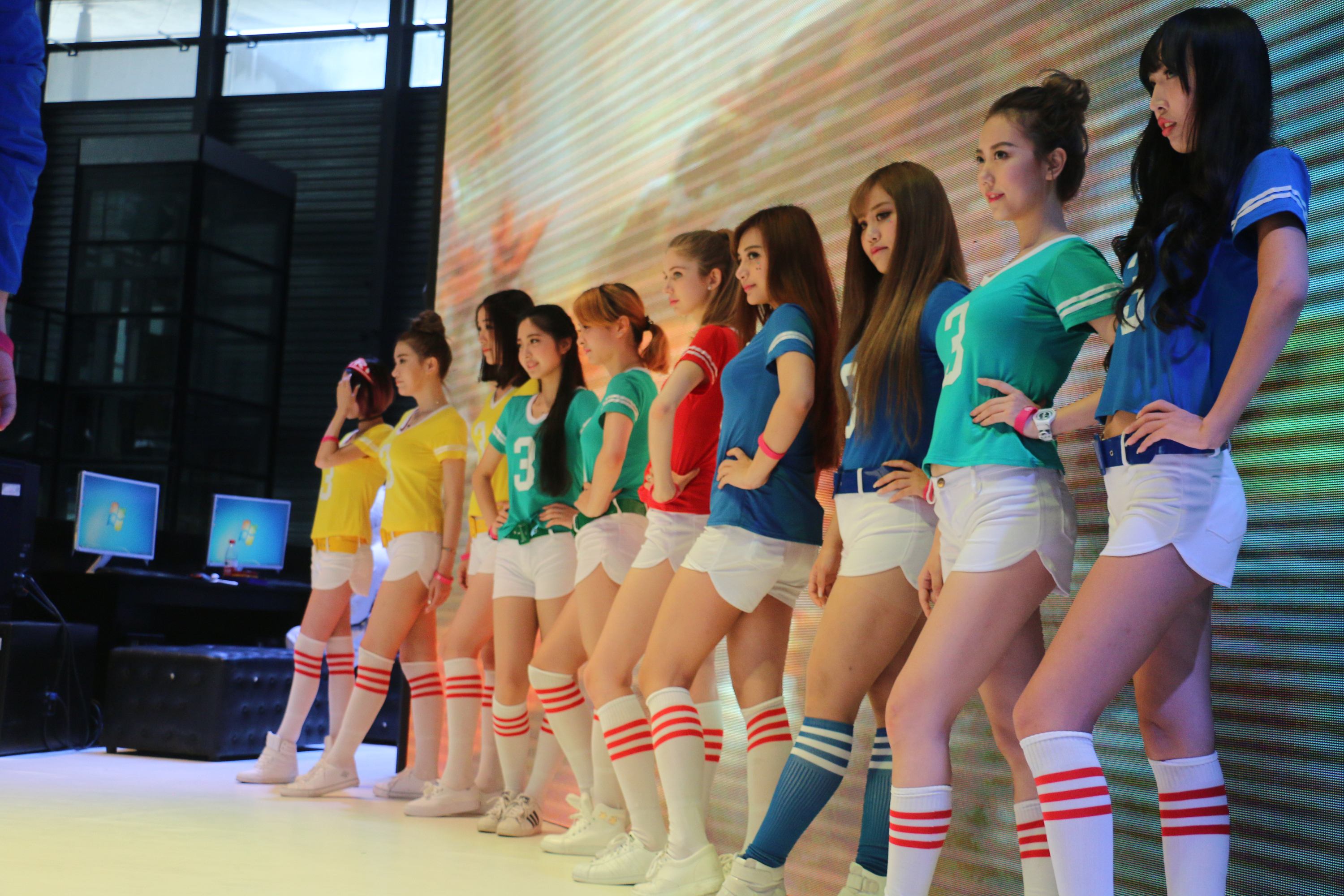 2015ChinaJoy SG美女 第一集。